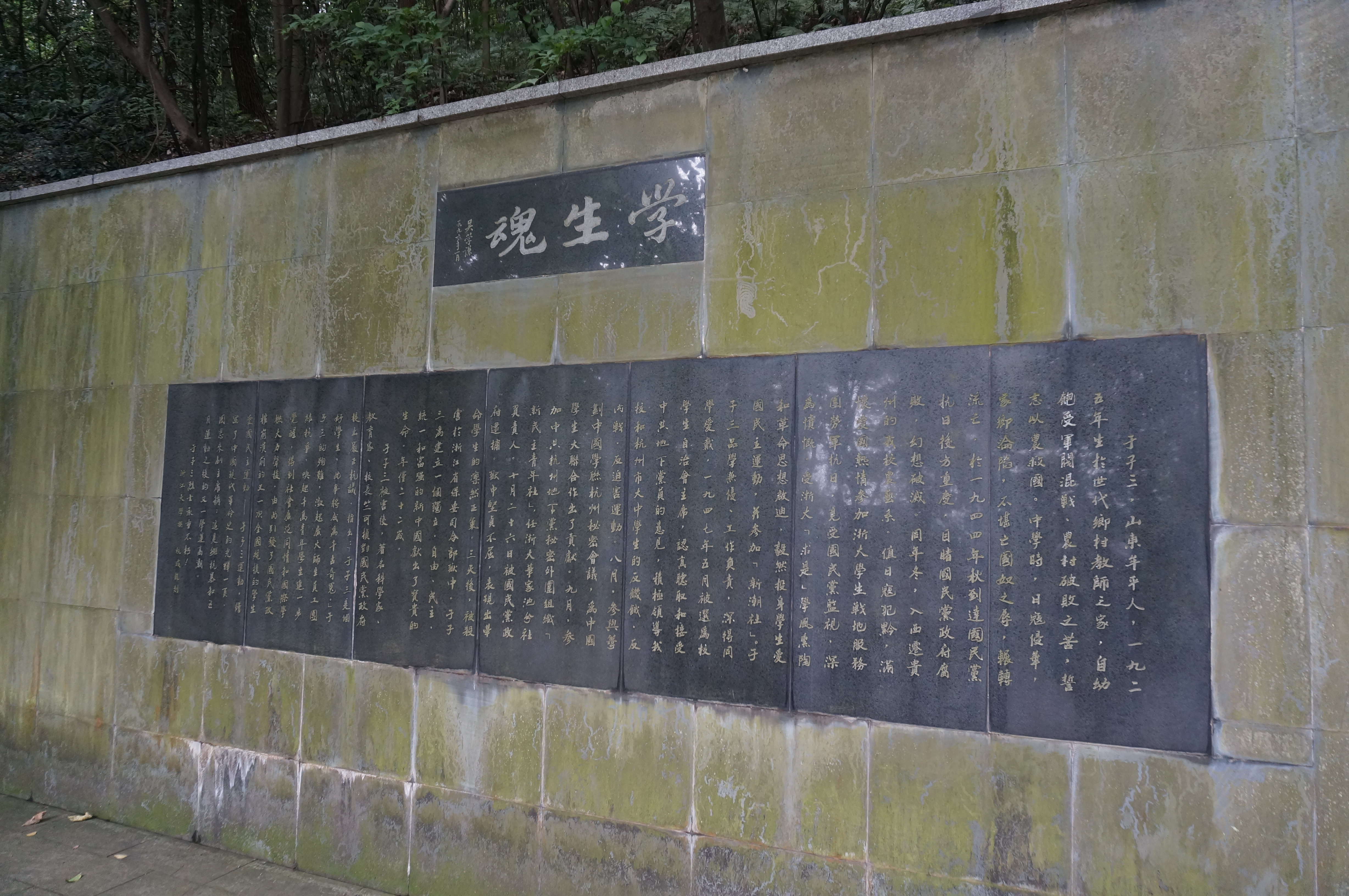 于子三墓，位于东墙上的题词。